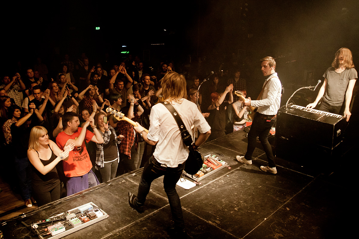 The Blue Van spiller på spillestedet Forbrændingen i Albertslund 6/10-12